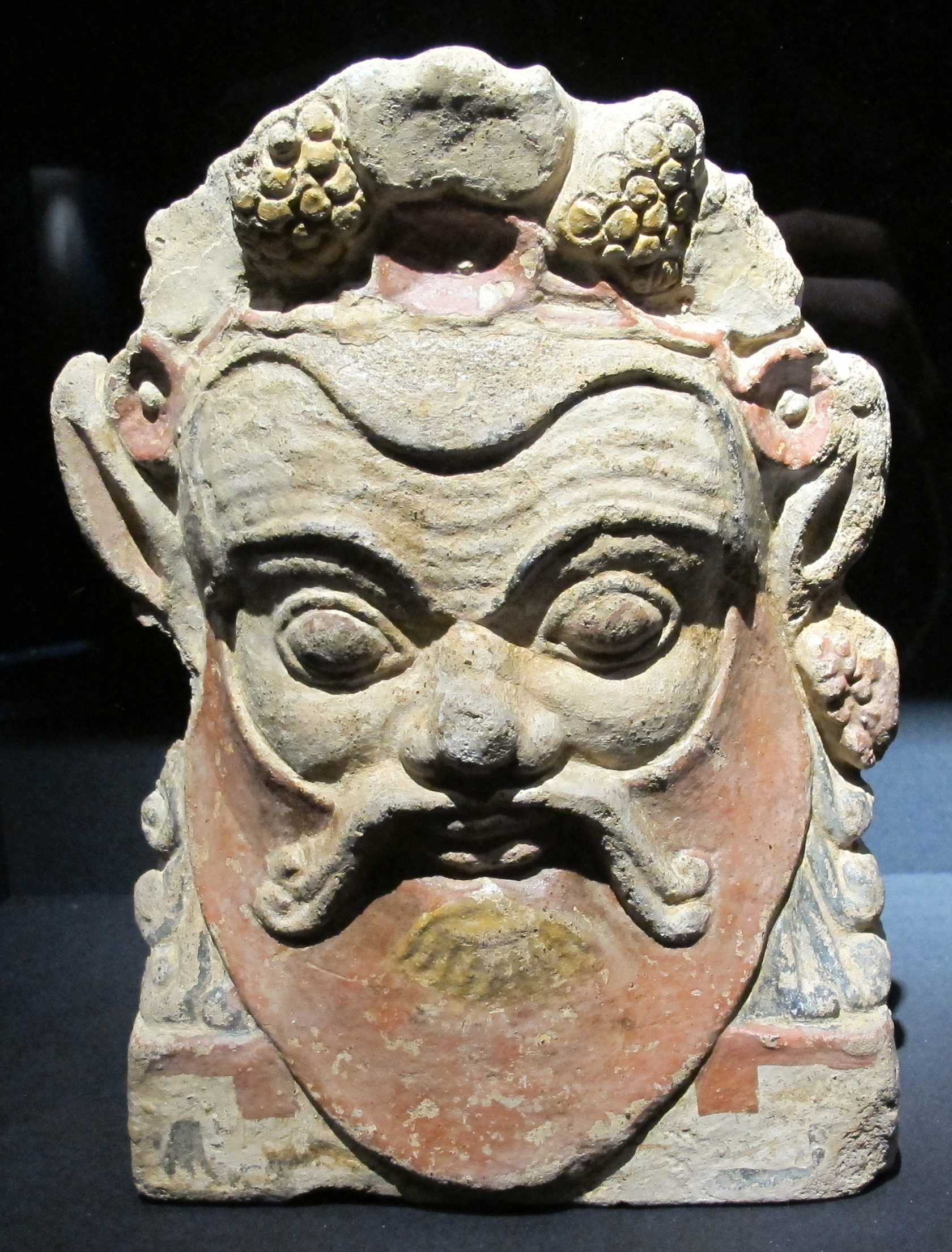 Monsters Exhibition (Palazzo Massimo, Rome, 2014)